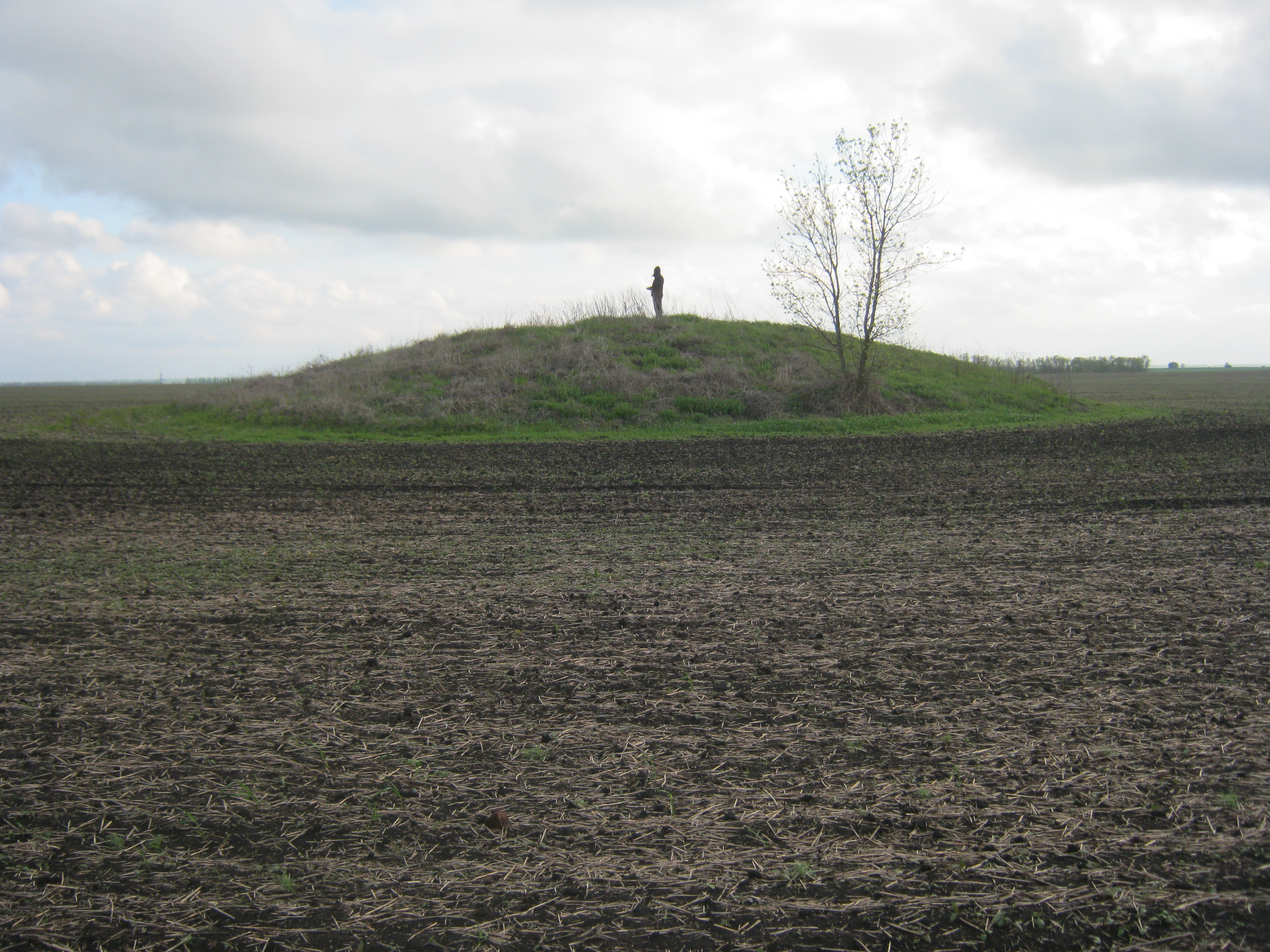 Кургани, Олексіївка, 10 курганів, розташовані на північ та на схід від села